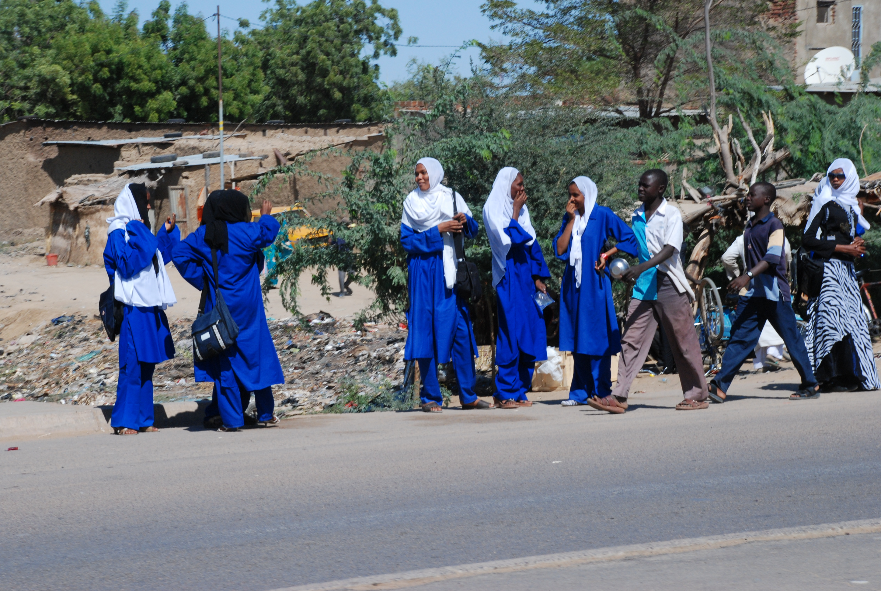 Jeunes filles de l'école coranique This is an image of Cultural Fashion or Adornment from Cameroon